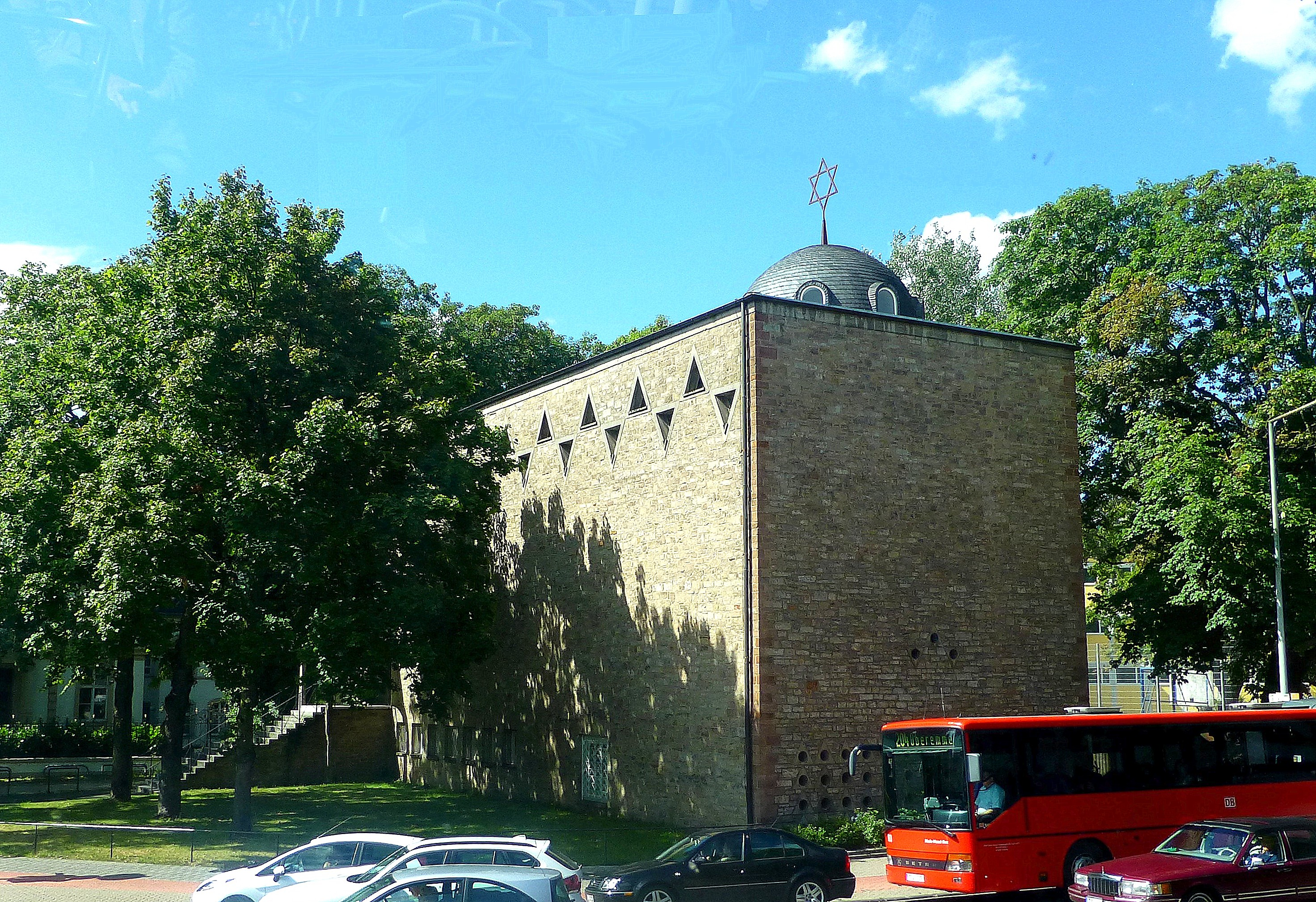 Trier - Synagoge